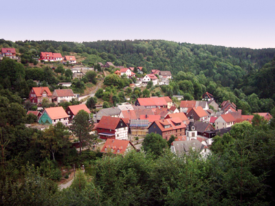 Neuwerk im Harz (Blick vom Fahnenkopf).